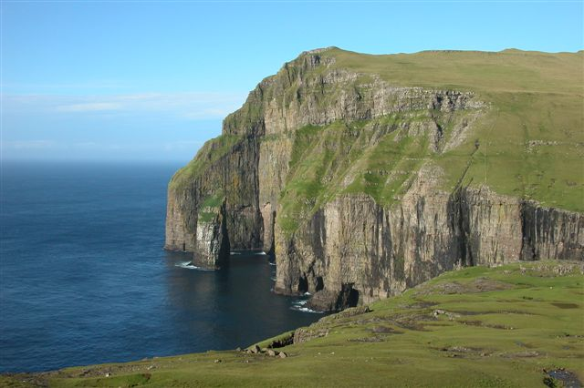 Ásmundurstakkur, Sandvík, Suðuroy